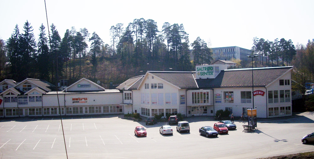 Saltrød kjøpesenter på Saltrød, Arendal